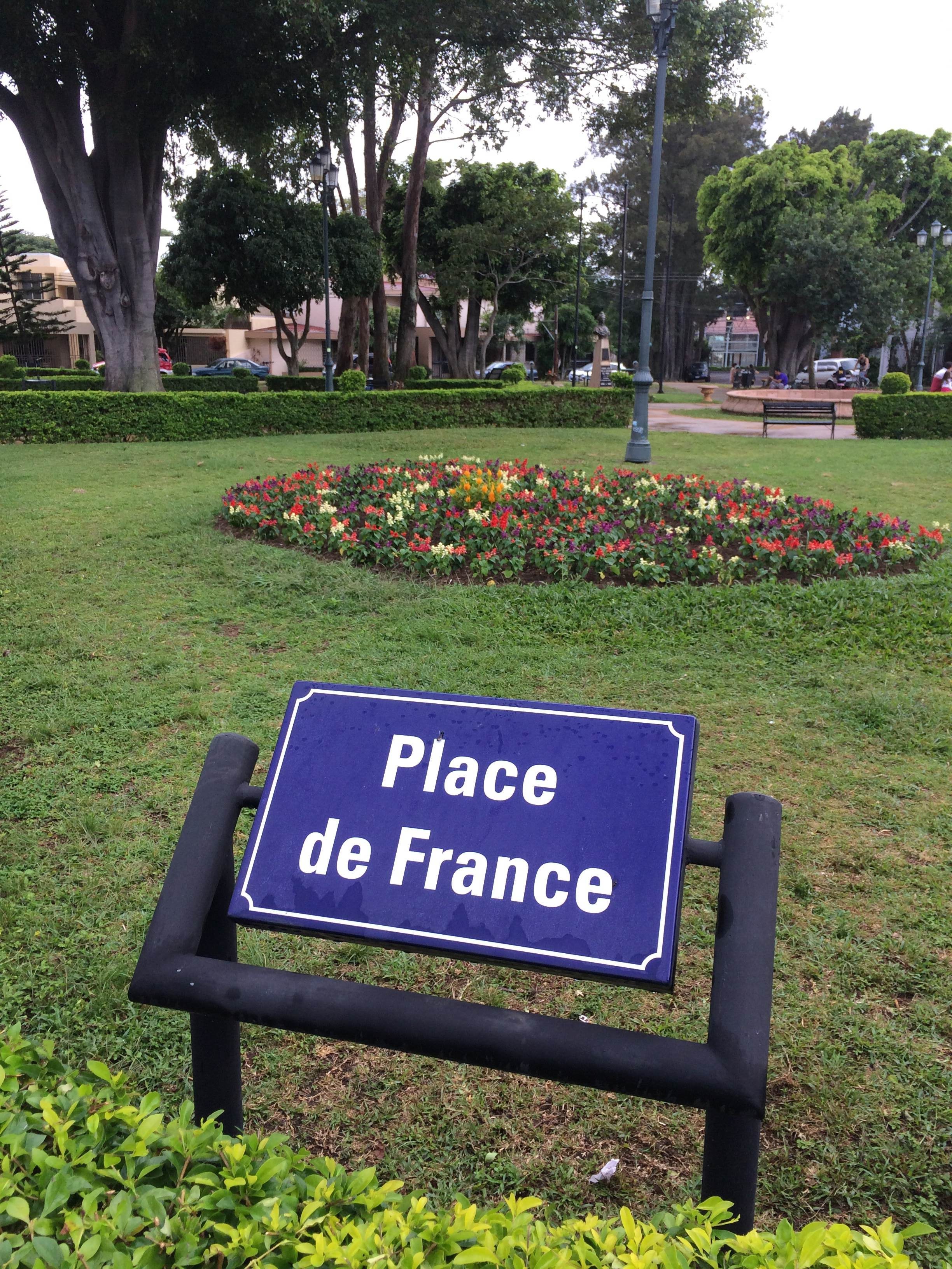 Place de France. San José, Costa Rica.